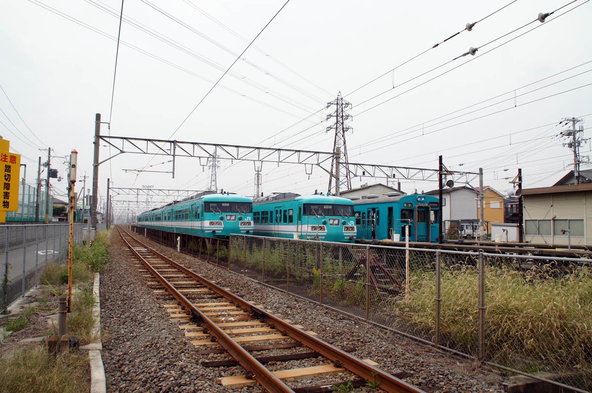 和歌山線 日根野電車区新在家派出所付近